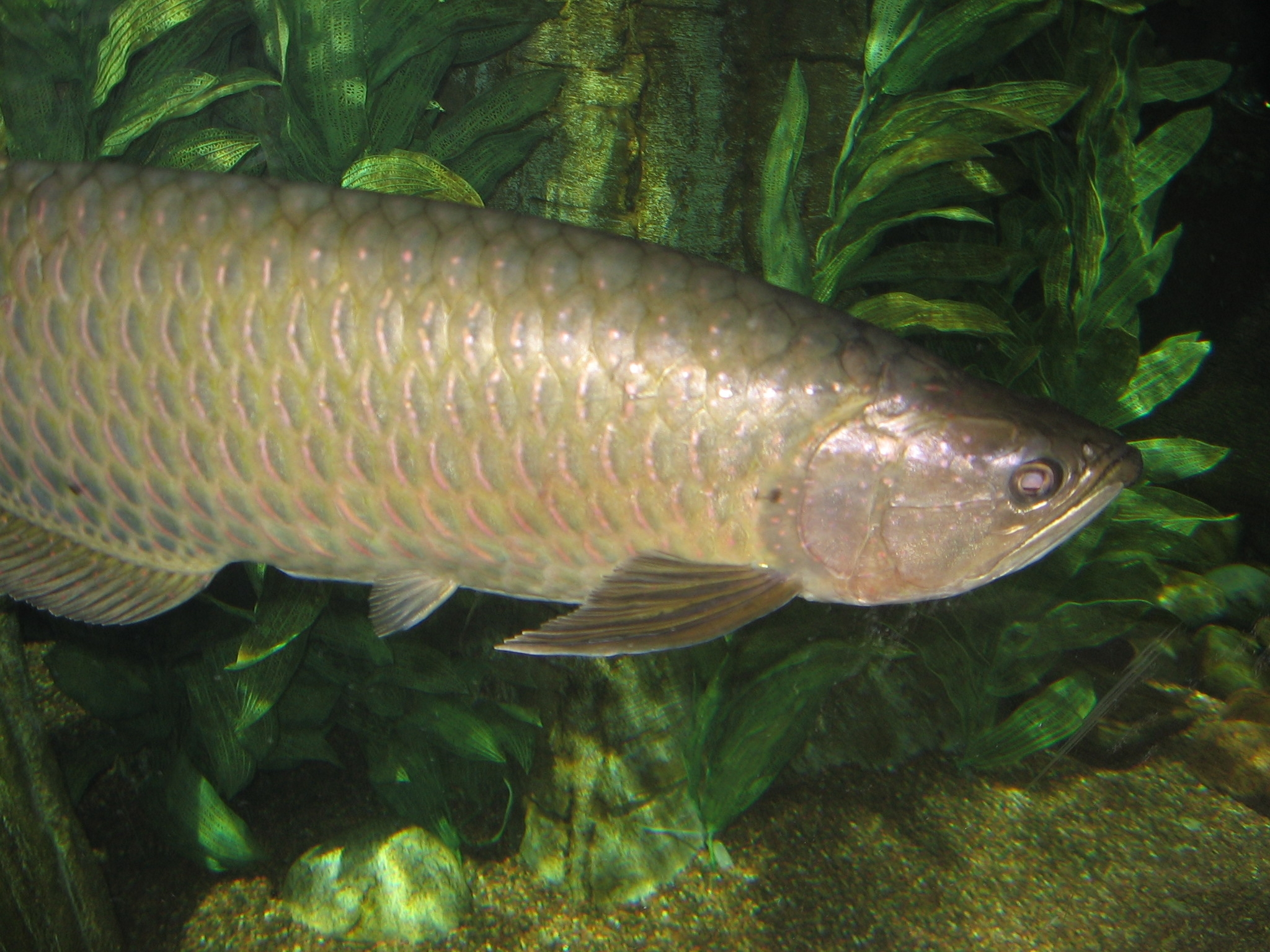 Gulf Saratoga (Australian Arowana) (Scleropages jardinii)